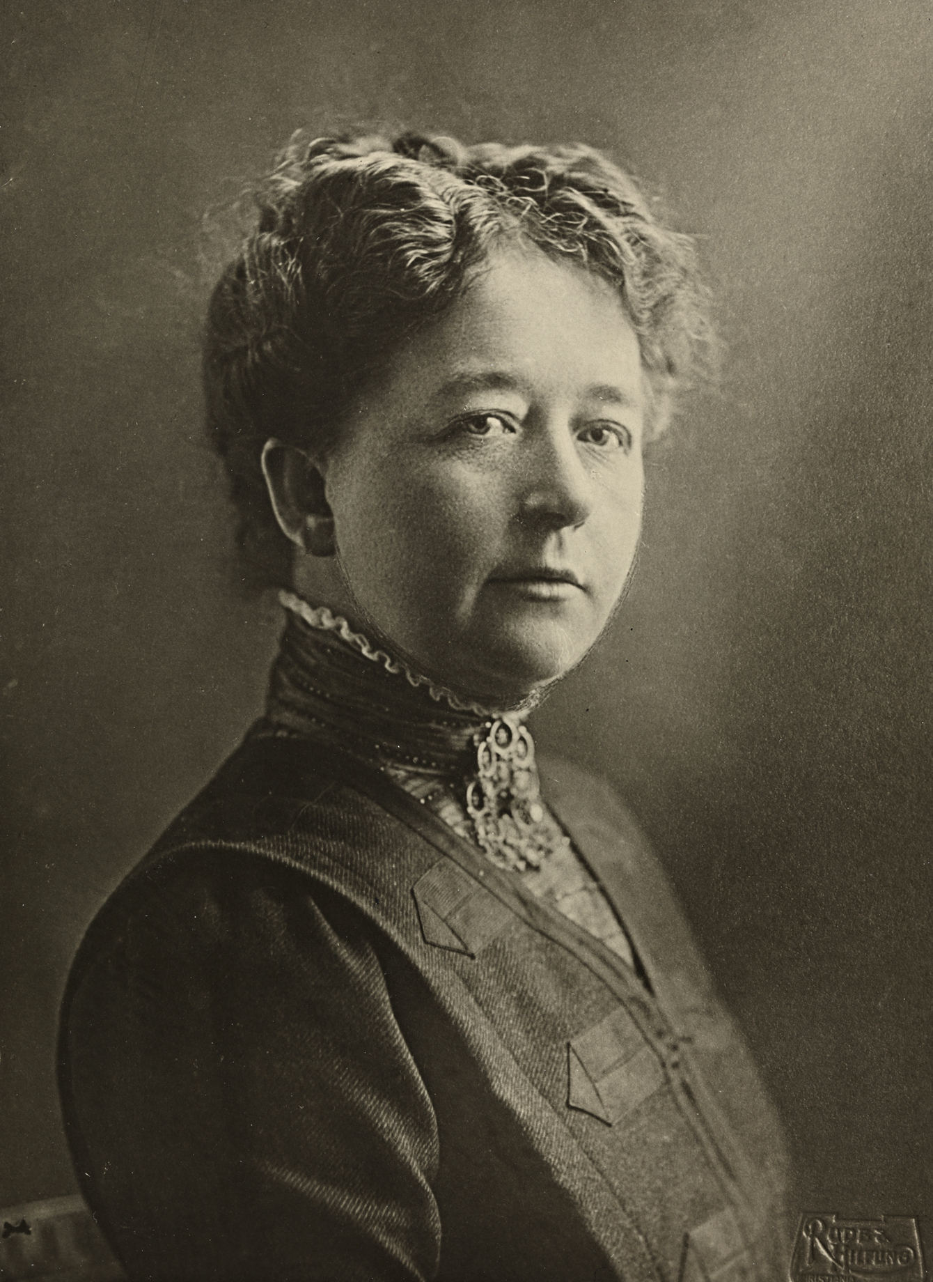 Kristine Bonnevie (1872-1948) var en norsk biolog og Norges første kvinnelige professor.